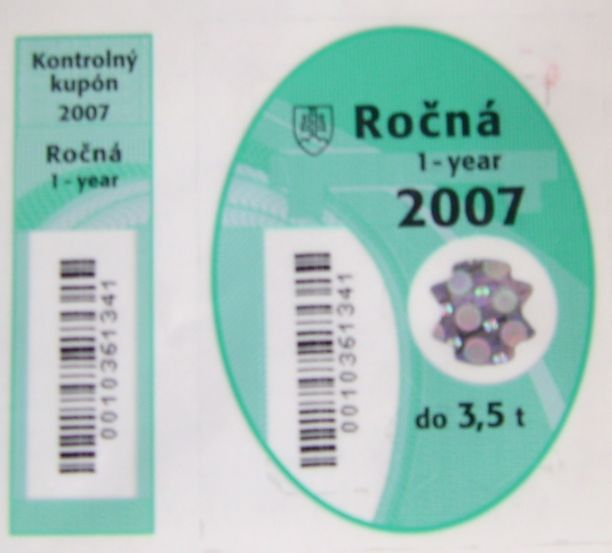 maut vignette road tax slovakia rocna